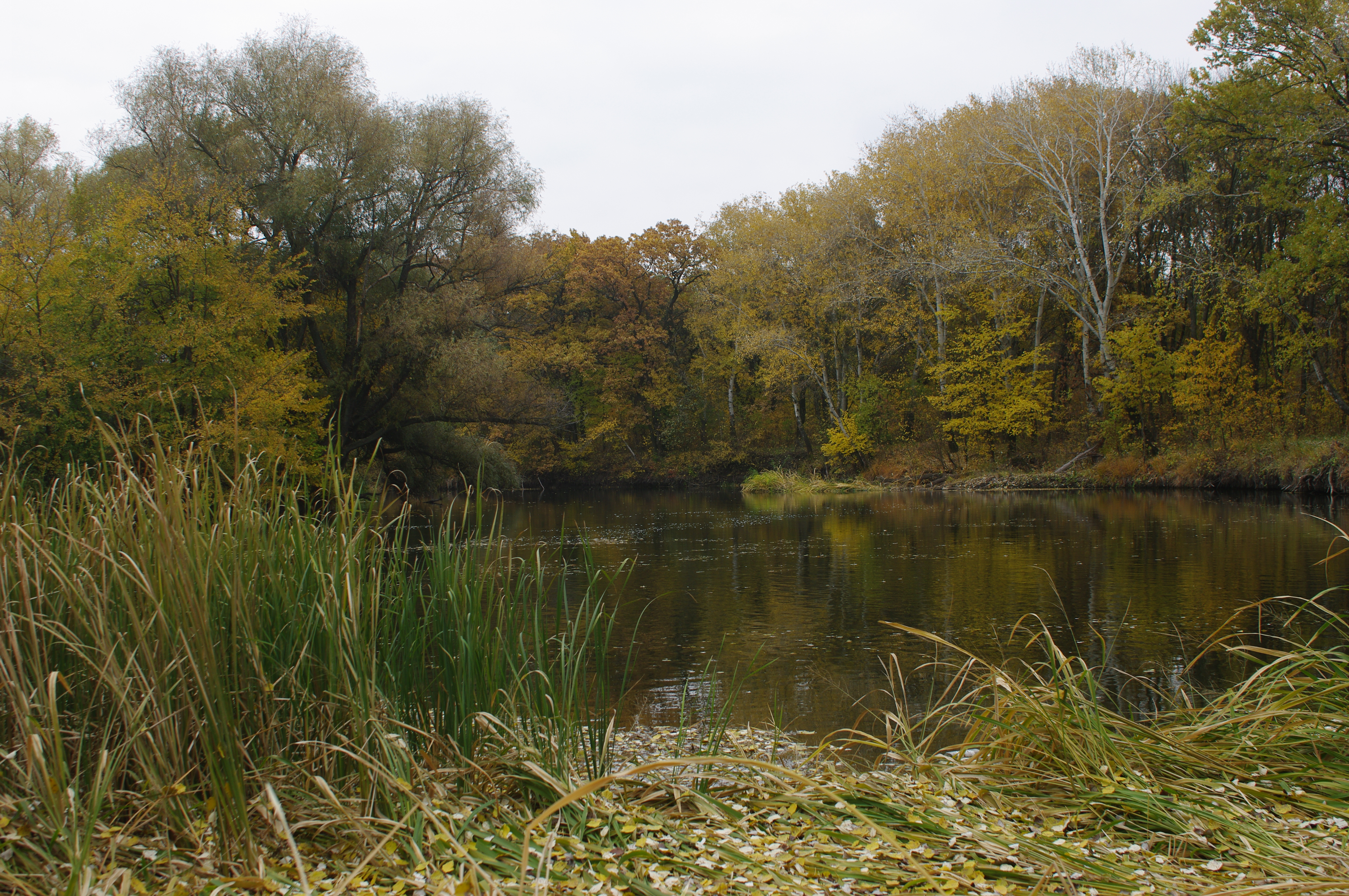 Айдарська тераса, Новоайдарський район, ДП «Новоайдарське ЛМГ»